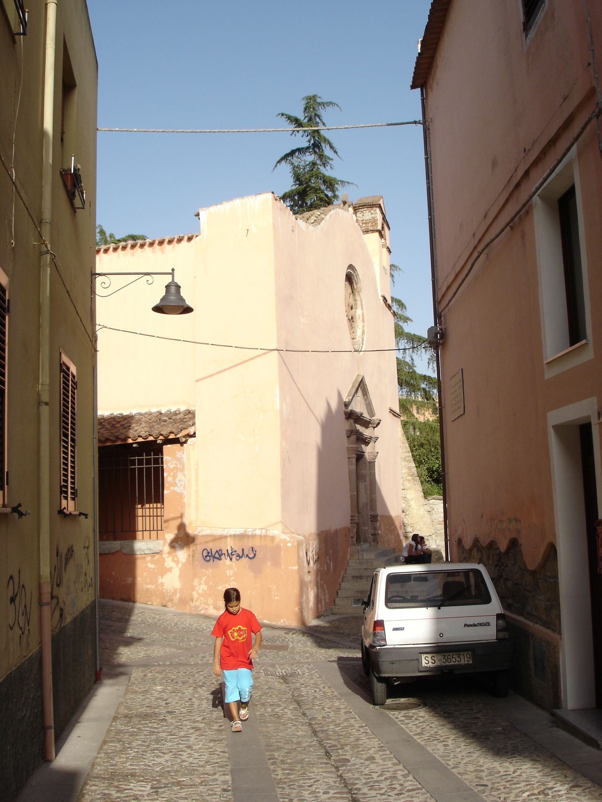 Veduta di scorcio